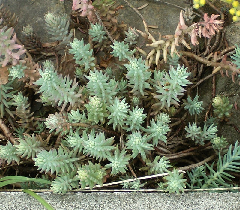 Sedum sexangulare (ce n'est pas le sedum repestre)